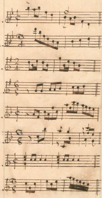 Table du volume XI des manuscrits de Parme (incipit des sonates 23 à 30, K. 410-417).